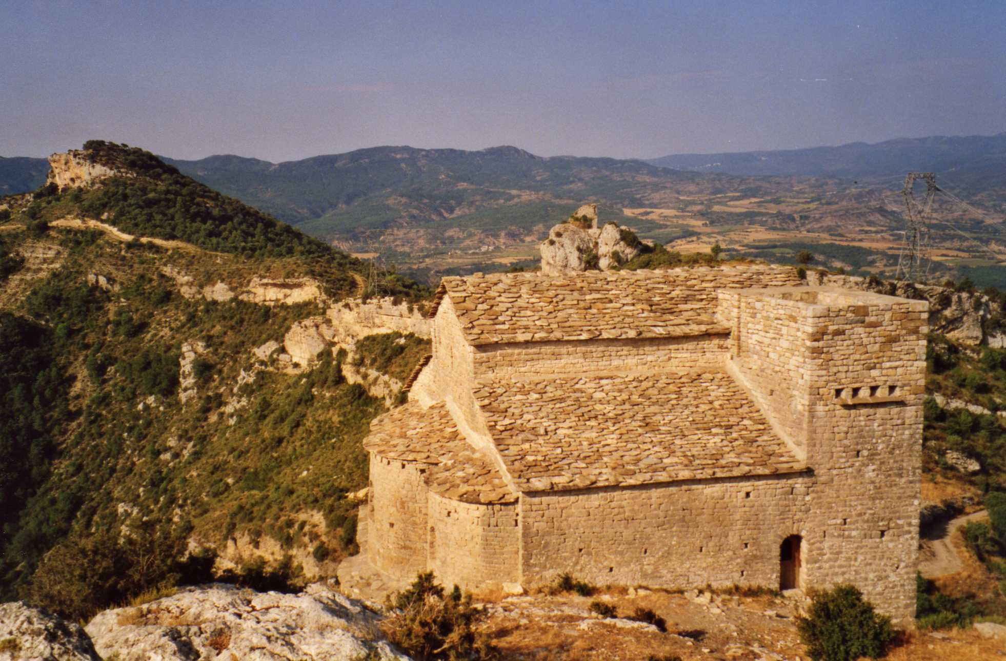 La iglesia-ermita fortificada de San Emeterio y San Celedonio, mandada construir por el rey Sancho "el Mayor" en el año 1030 como templo para el cercano castillo de Samitier. Se encuentra sobre un acantilado extraplomado sobre el estrecho de Entremón que atraviesa el río Cinca, en el entorno de la población de Samitier (municipio de La Fueva, Huesca).